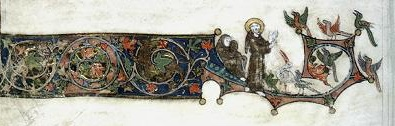 Graduel de Cologne Guérison 232v détail